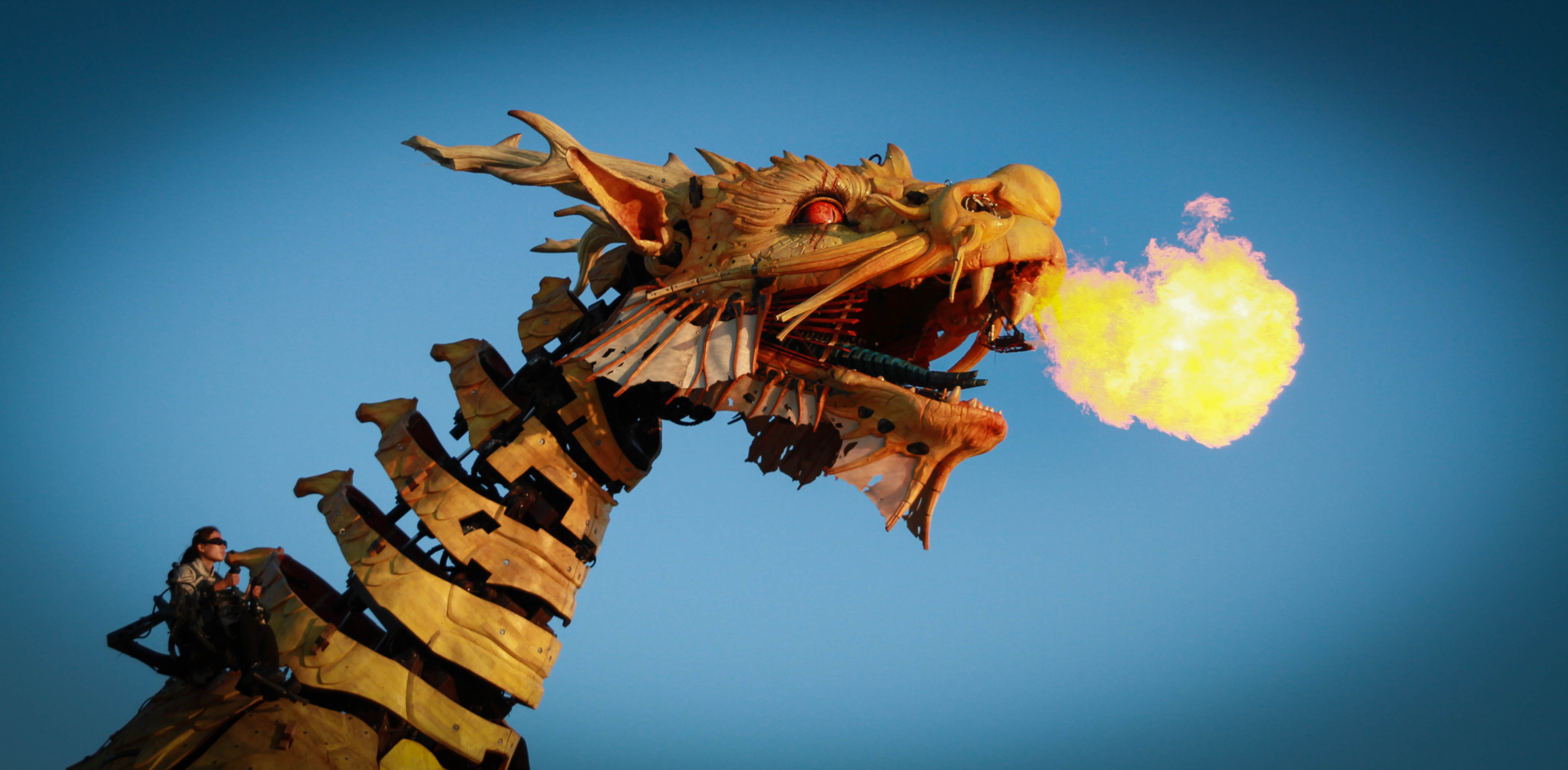 La dernière création de la compagnie La Machine de Nantes, le cheval-dragon Long Ma.